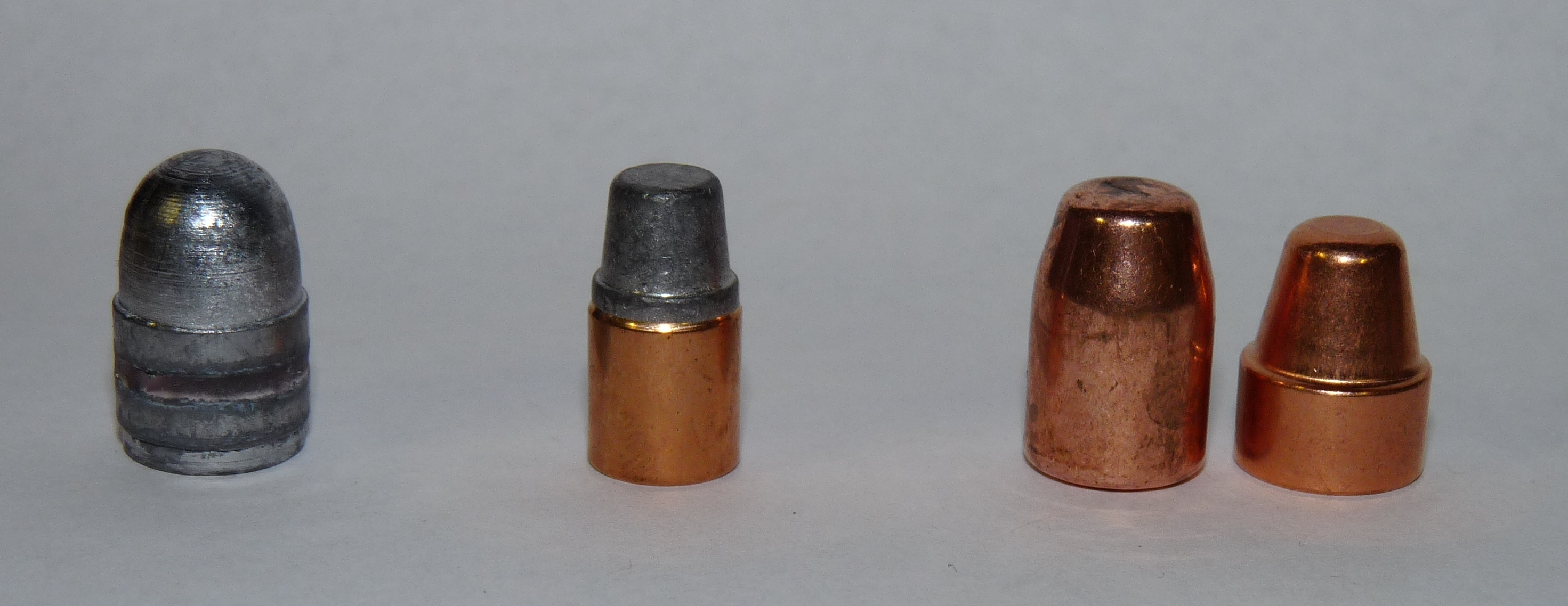 Verschiedene Geschossarten (Blei-Rundkopf, Teilmantel und Vollmantel-Kegelstumpf)